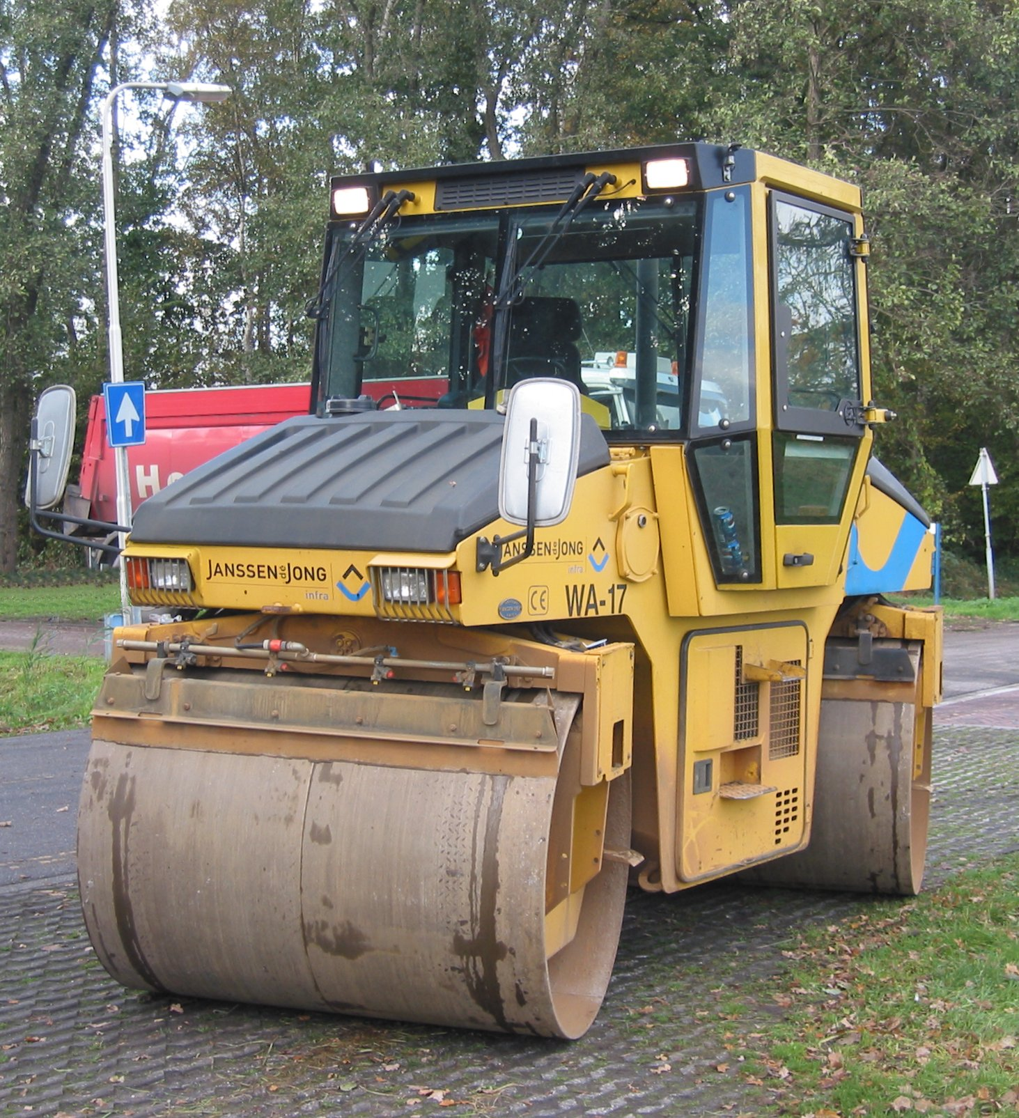 wegwals